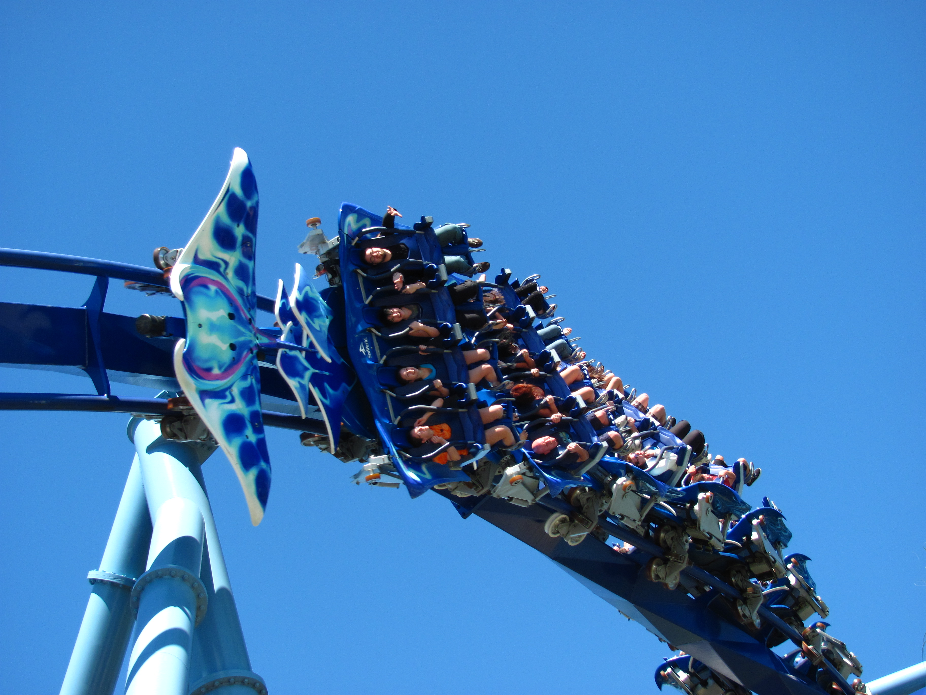 Manta